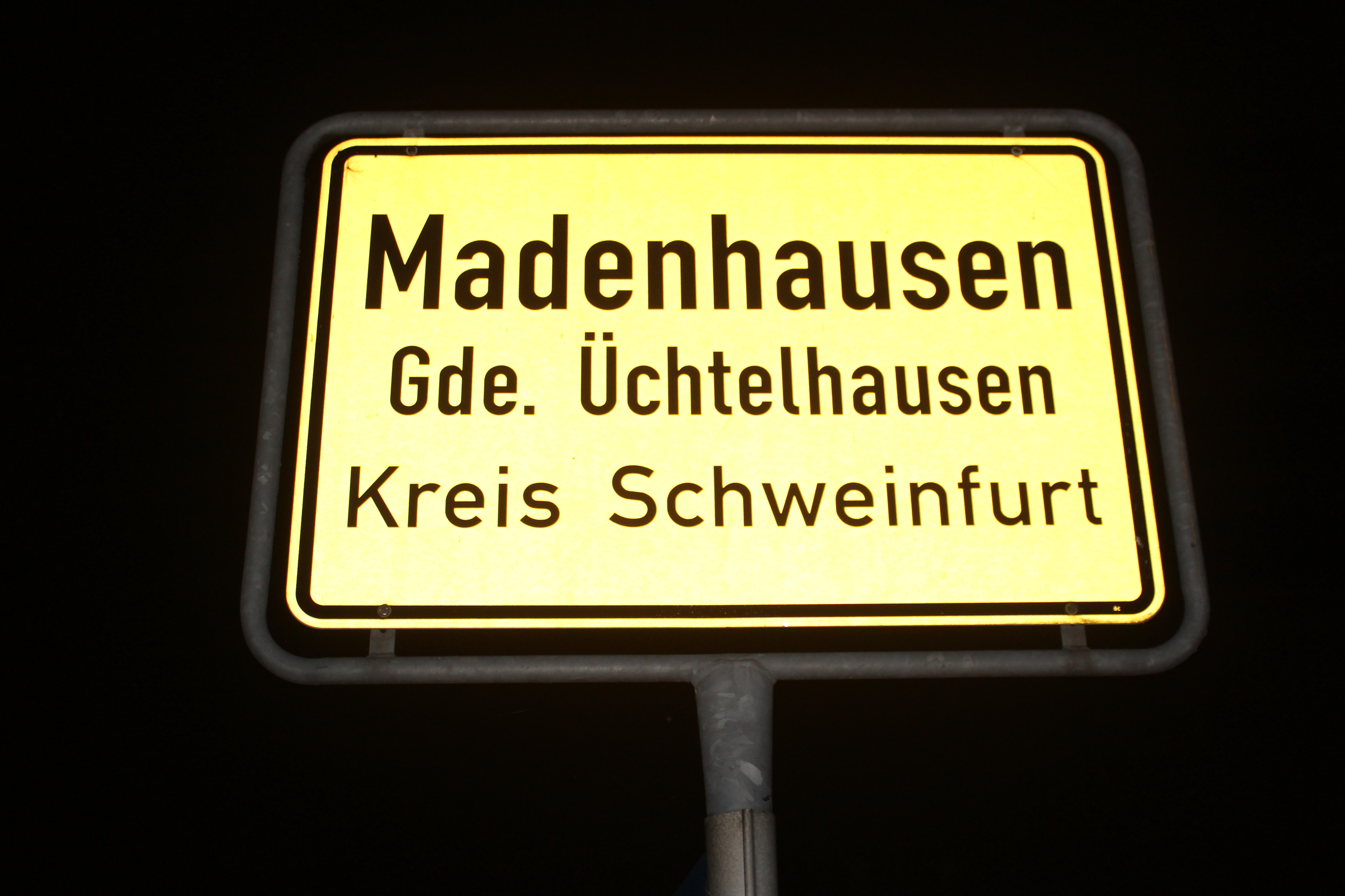 Ortsschild von Madenhausen